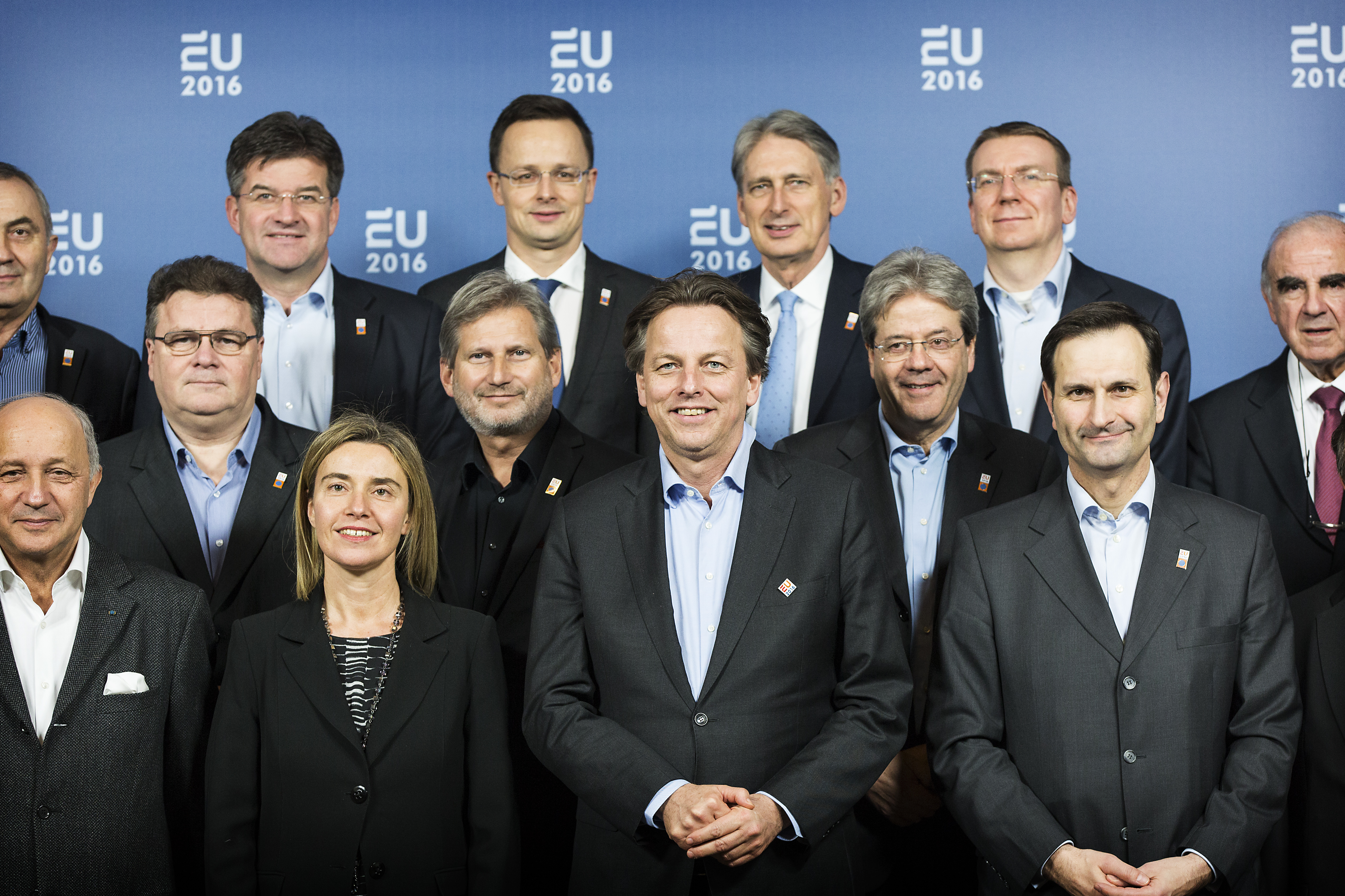 Amsterdam, 5 februari 2016 / Amsterdam 5th of Februari. Familie foto Gymnich/Buitenlandse Zaken met minister Bert Koenders en Frederica Mogherini. Family photo of Gymnich/Foreign Affairs with minister Bert Koenders en Frederica Mogherini. Foto: Rijksoverheid/Valerie Kuypers – Photograph: Dutch Government/Valerie Kuypers